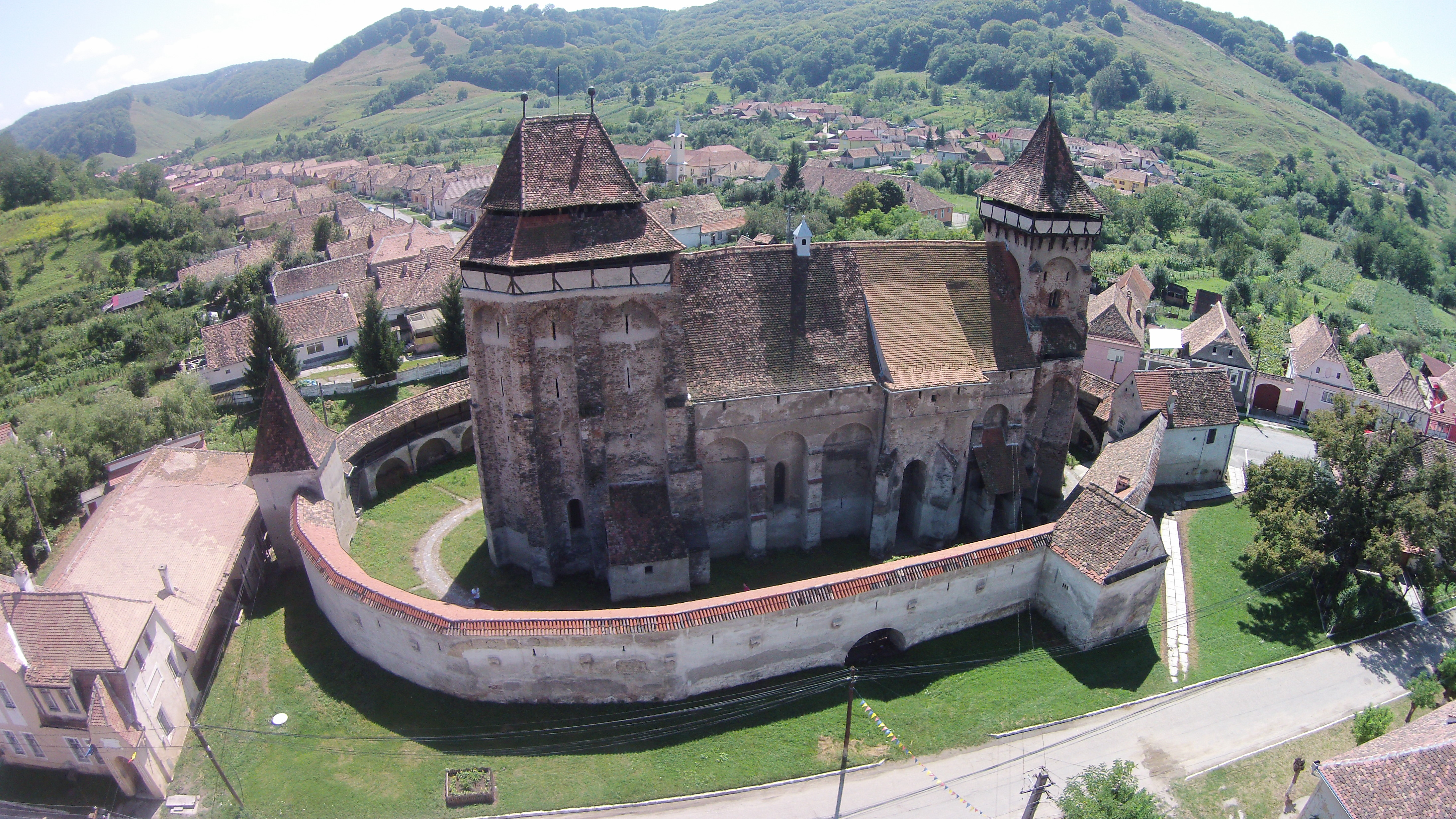 Ansamblul bisericii evanghelice fortificate-vedere aeriana